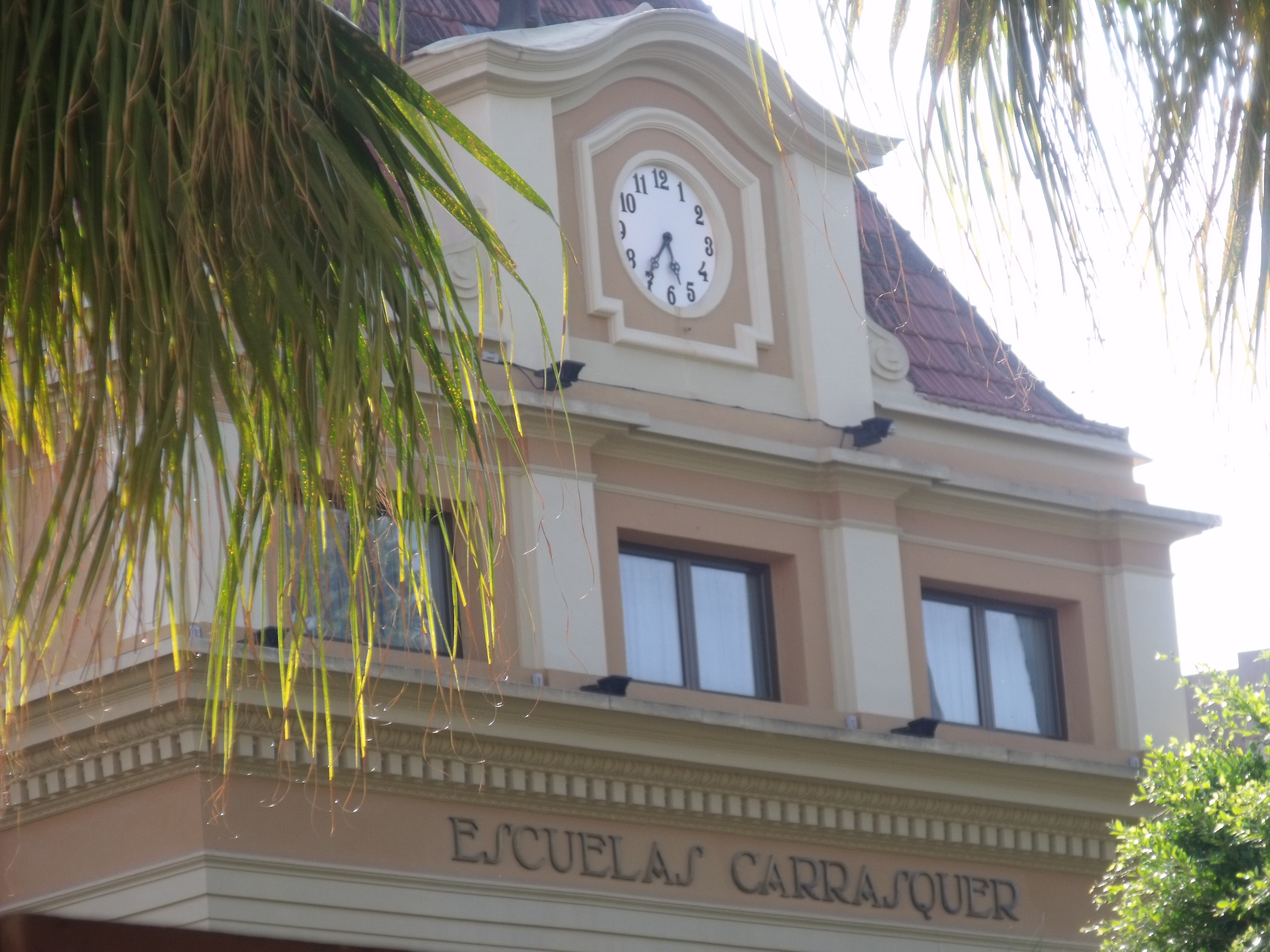 Edificio y jardines destinados a escuelas por donación de un vecino de la ciudad, Emilio Carrasquer . Construido en la década de los años 2 del siglo XX por Emili Artal y Julià Ferrando.